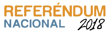 Referéndum Nacional Perú logo 2018